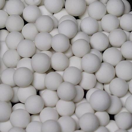 Silica Gel weitporig